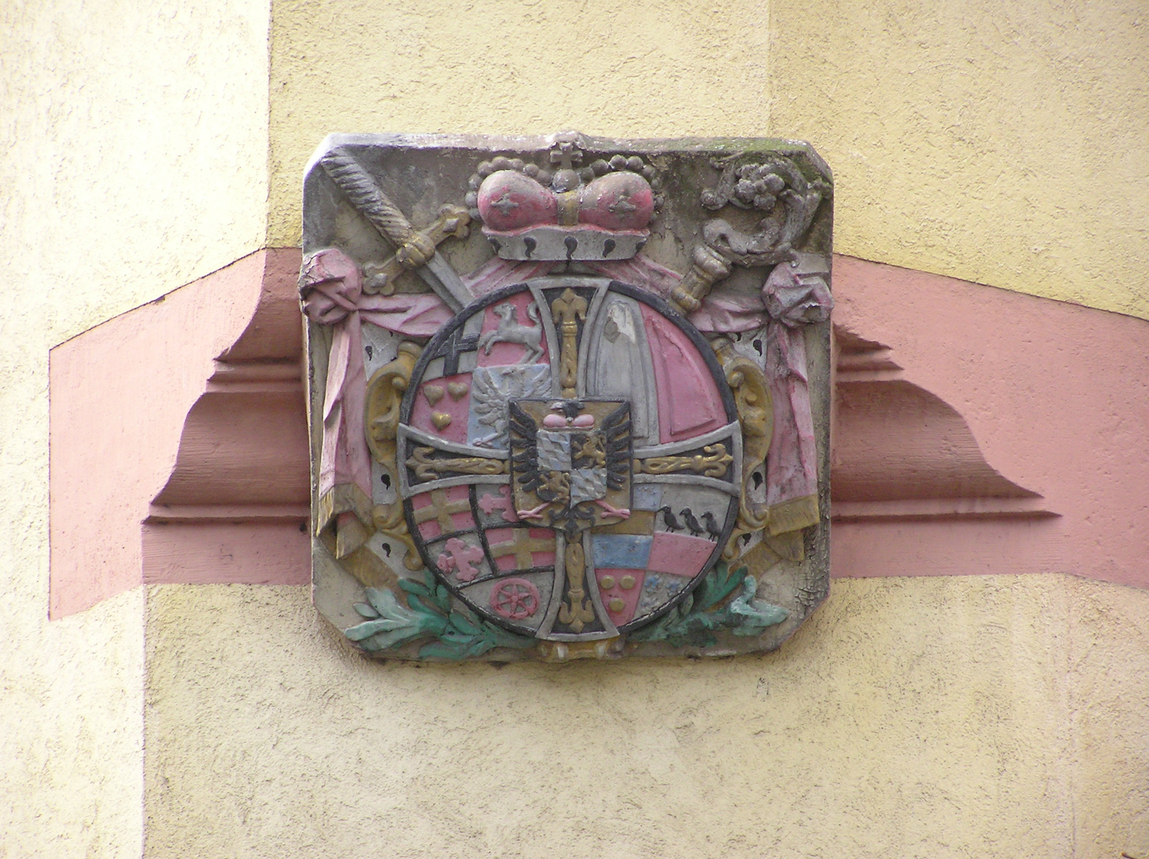 Wappen des Hochmeisters des Deutschen Ordens Clemens August I. von Bayern, Haus des Deutschritterordens in Weingarten (Baden) Aufgenommen am 22.10.2005